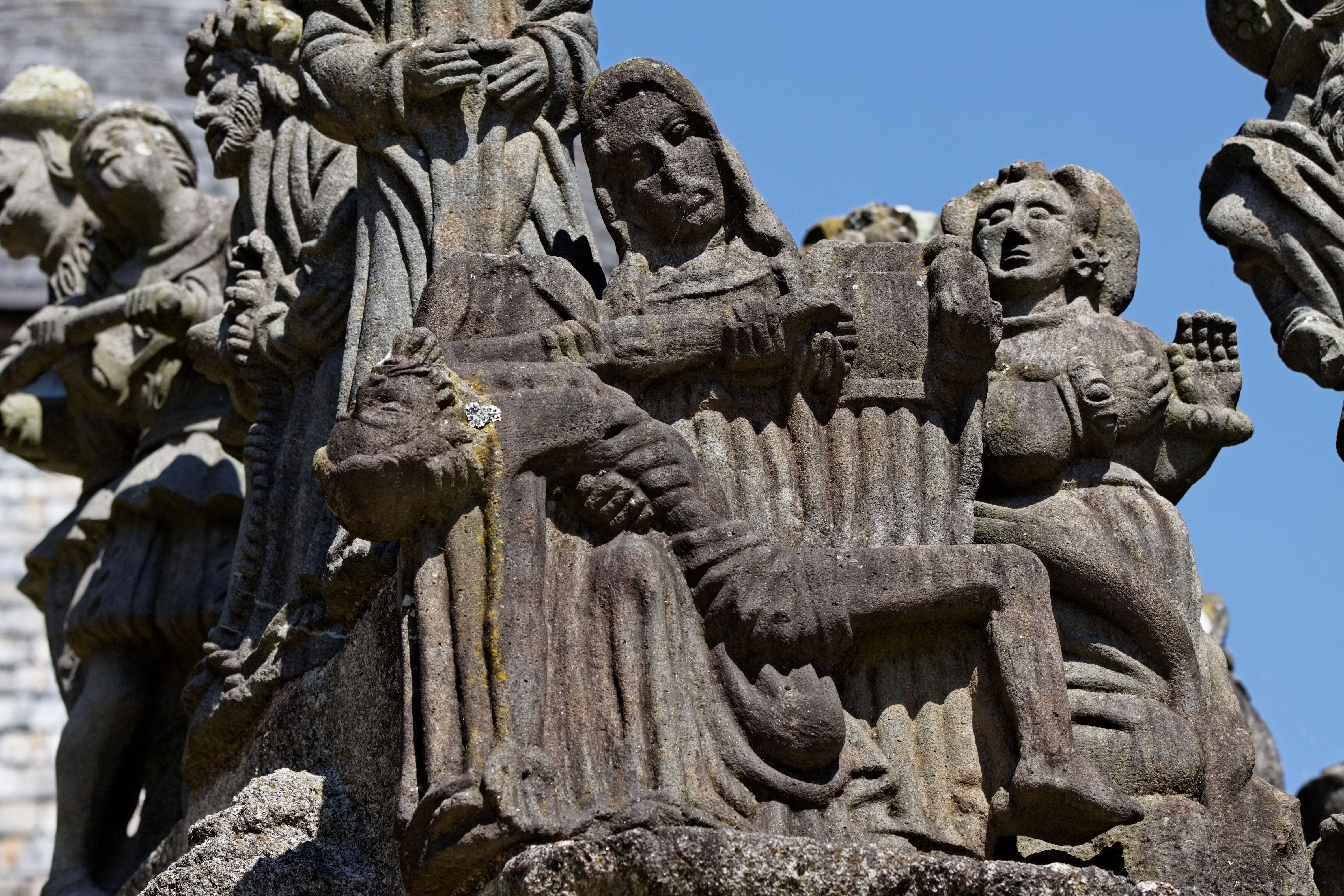 Vue du calvaire de l'enclos paroissial de Guimiliau.